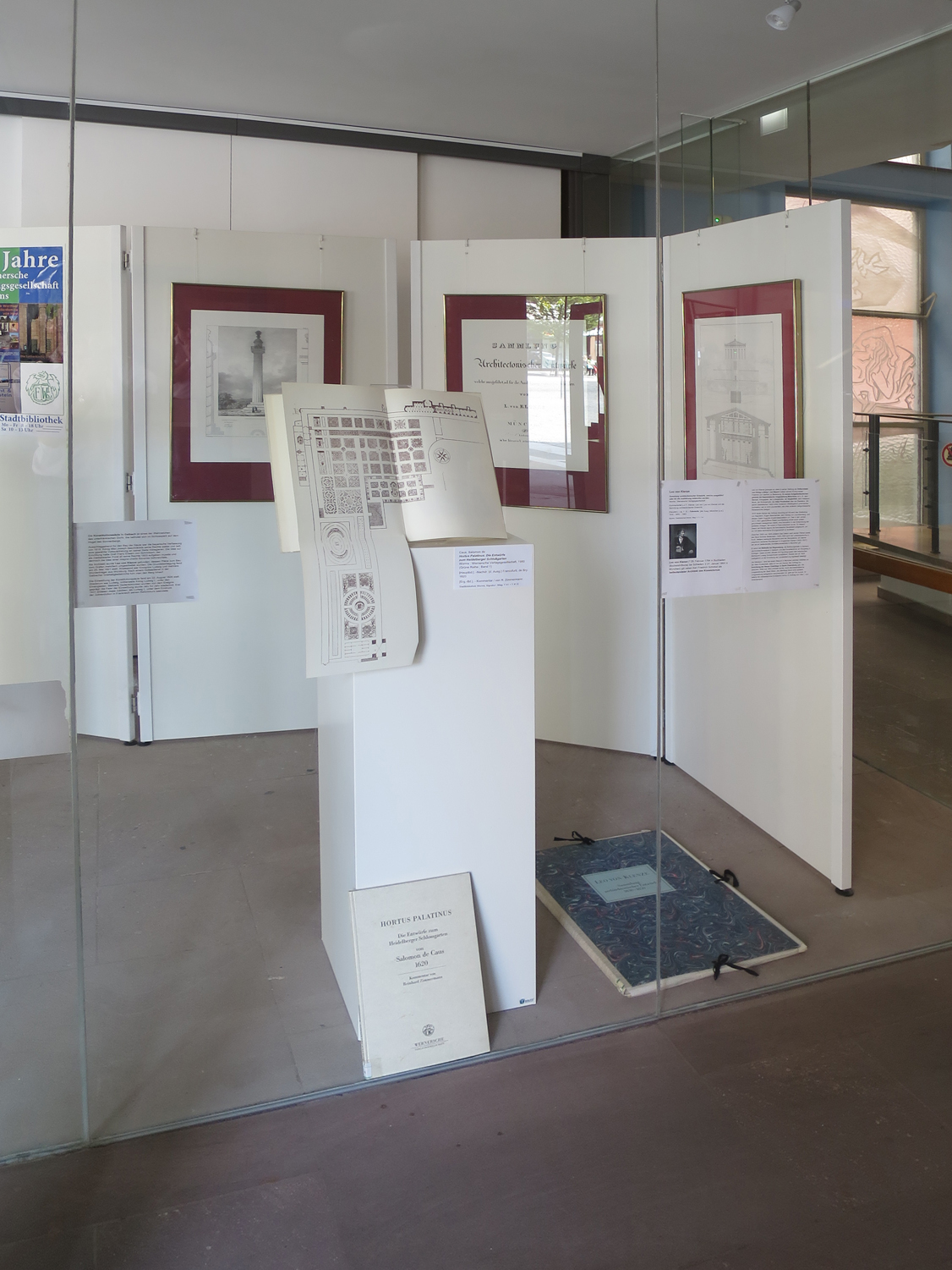 Schaufenster der Stadtbibliothek Worms. Ausstellung: 40 Jahre Wernersche Verlagsgesellschaft in der Stadtbibliothek Worms